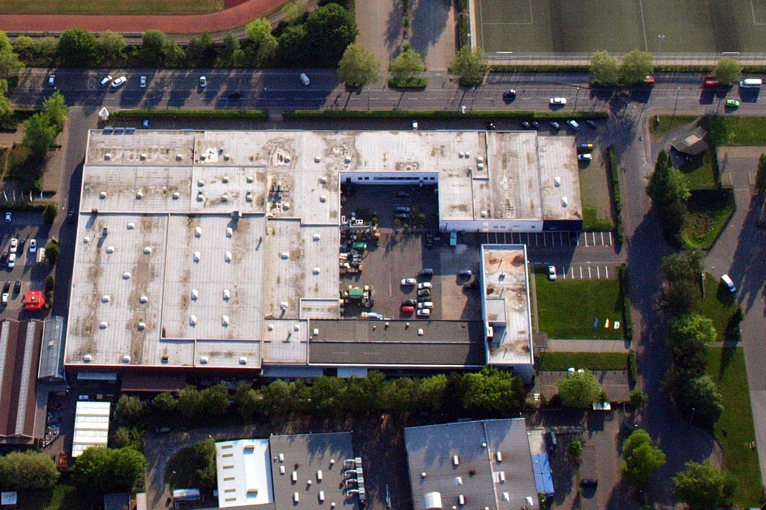 GKN-Sintermetals Bonn Bad Godesberg, Werkzeugbau.